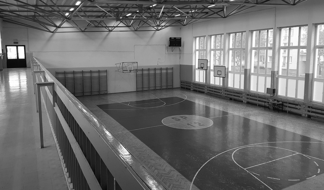 Hala gimnastyczna Szkoły Podstawowej nr 12 na Zachodzie